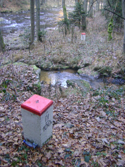 Grenzstein der polnisch-tschechischen Grenze in dem verlassenen Dorf Rothflössel (Czerwony Strumień) in der Gemeinde Mittelwalde (Międzylesie), Niederschlesien, Polen.